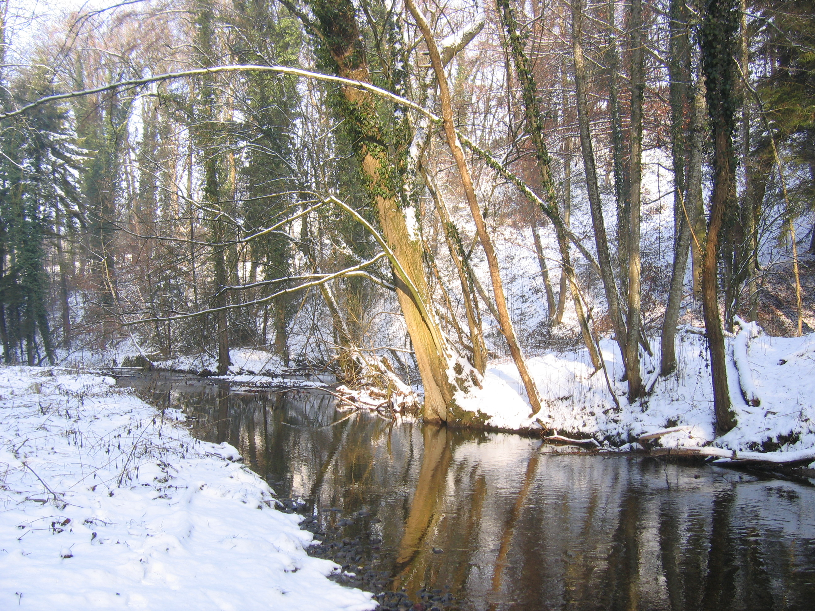 Nonnenbach vor der Kressbronner Mitelmühle